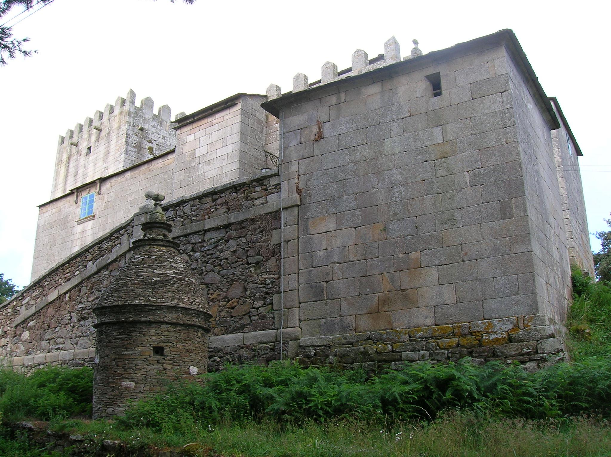 La fortaleza de San Paio de Narla, también conocida como Torre de Xía, se encuentra en el municipio de Friol (Lugo).